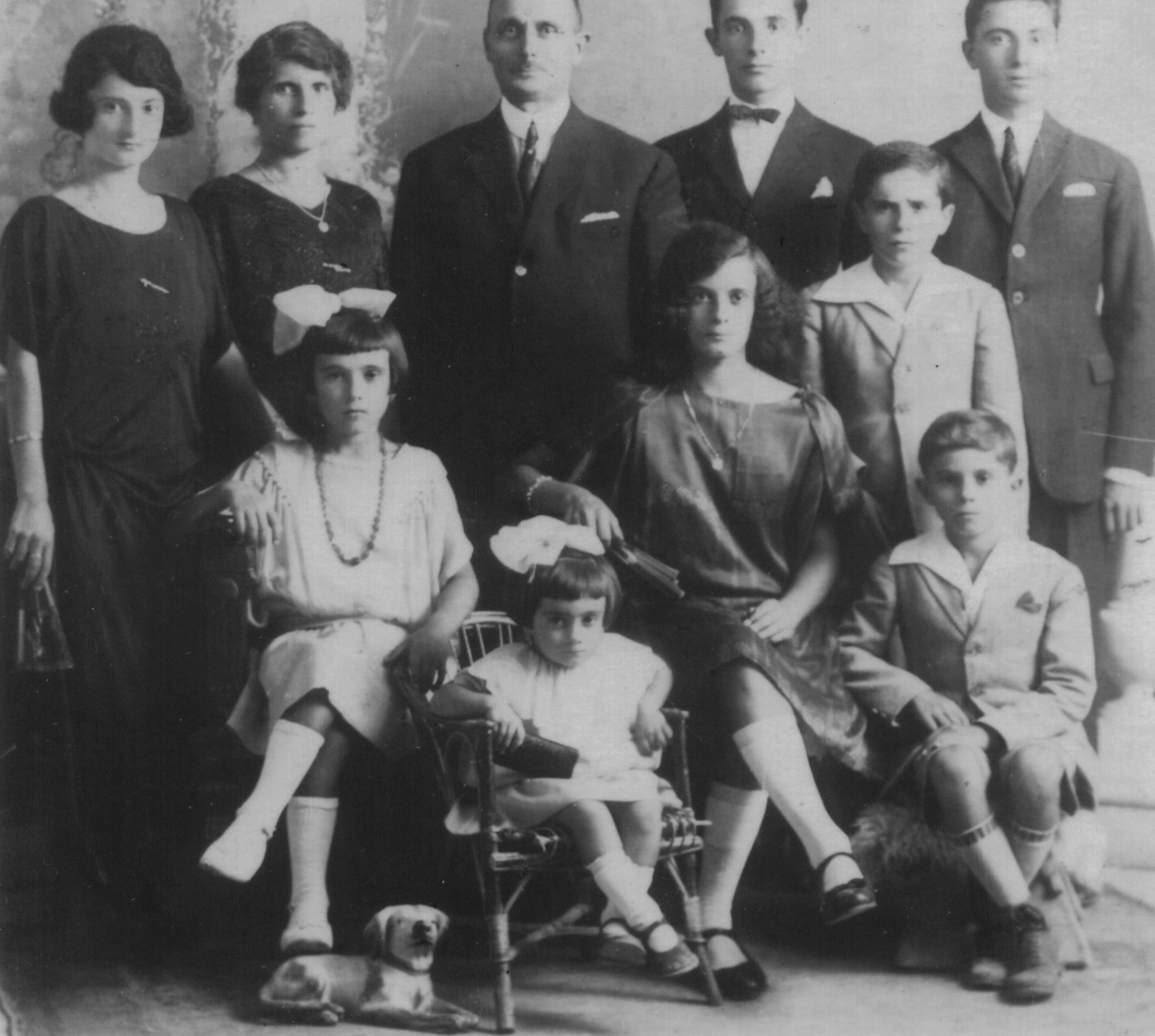 La famiglia di Giuseppe Riggio nell'anno 1925.